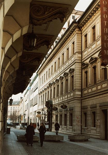 Kolovratský palác (G. D. Orsi), Staré Město, Praha